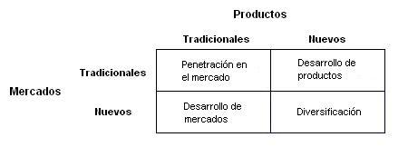 Representación en castellano de la matriz de Ansoff